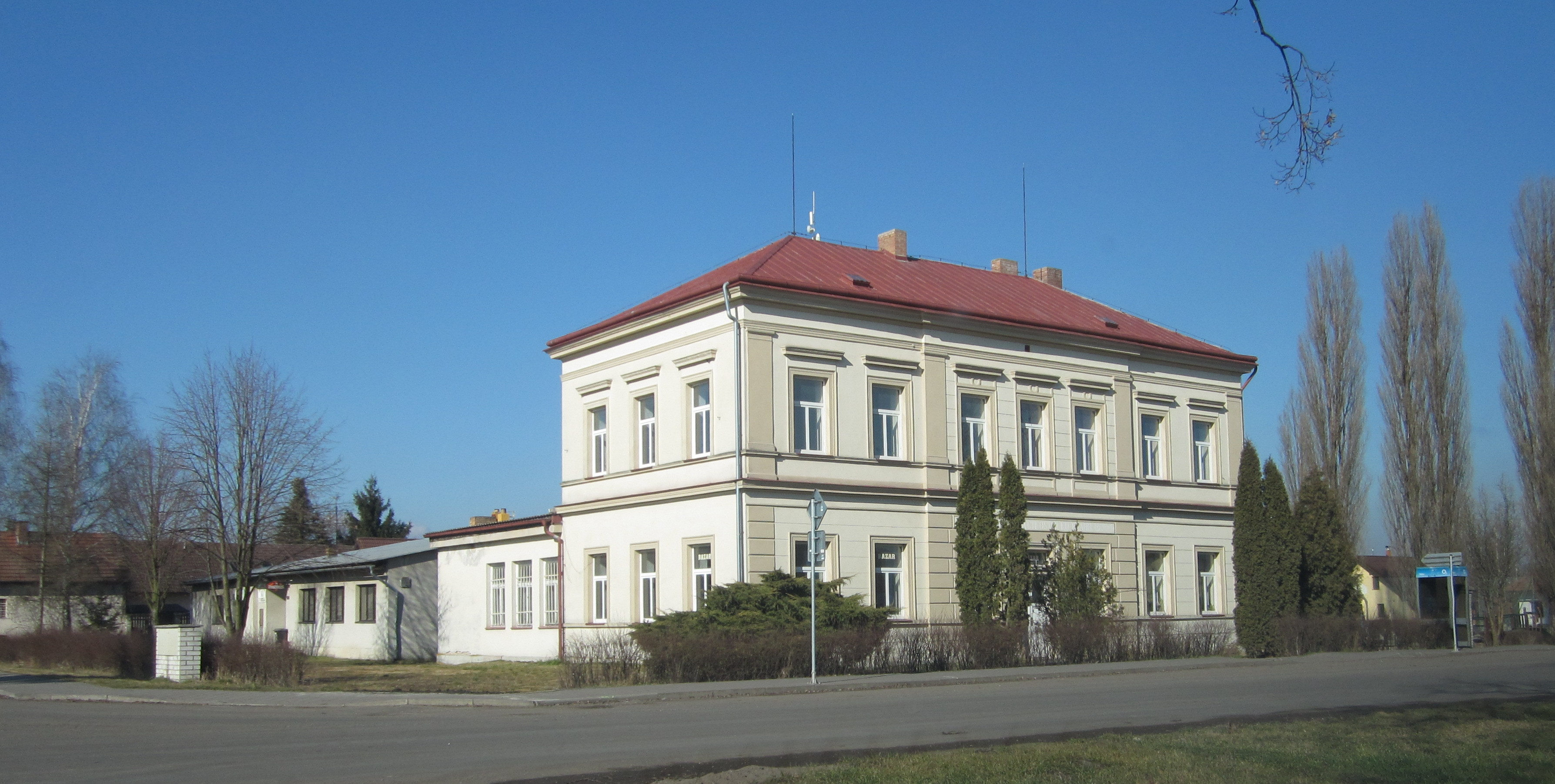 Úmyslovice